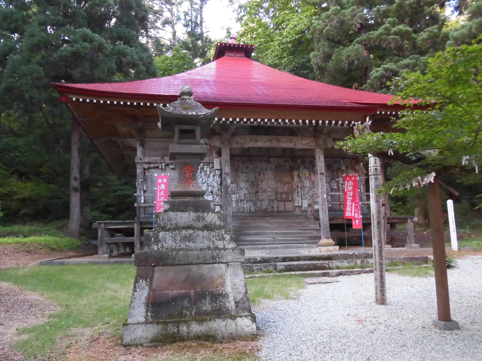 小松沢観音の本殿。山形県村山市に所在。 最上三十三観音霊場の第二十番札所。